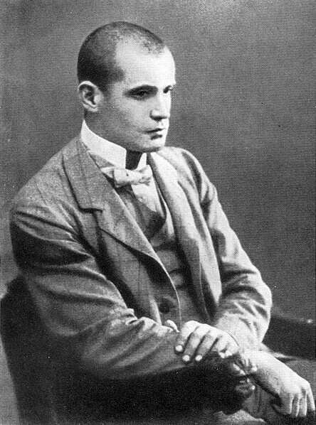 Kacsóh Pongrác magyar zeneszerző, zenepedagógus, tanár.